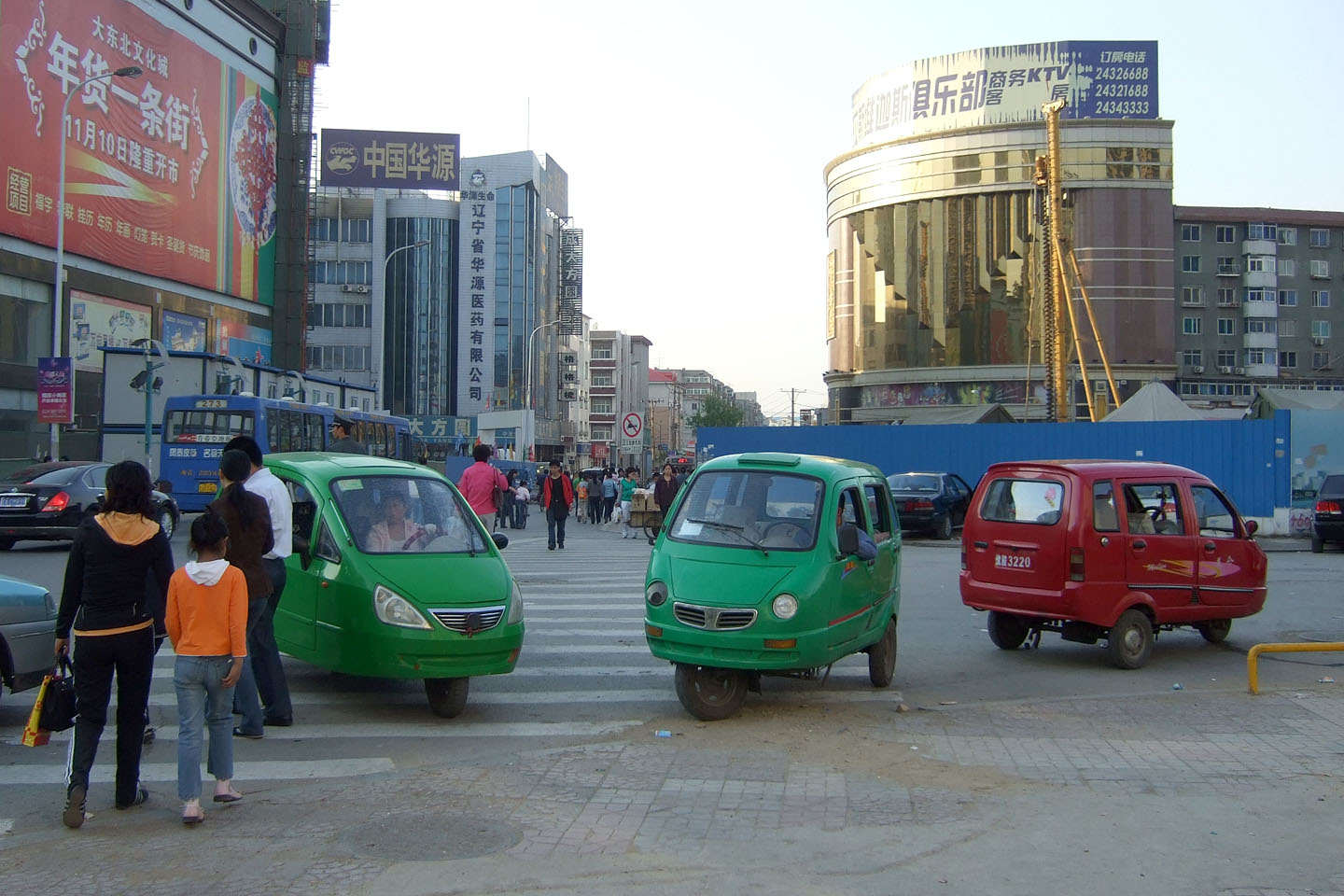 Auto-rickshaw in Shenyang,China